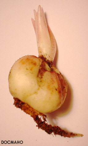 Lilium taliense bulb